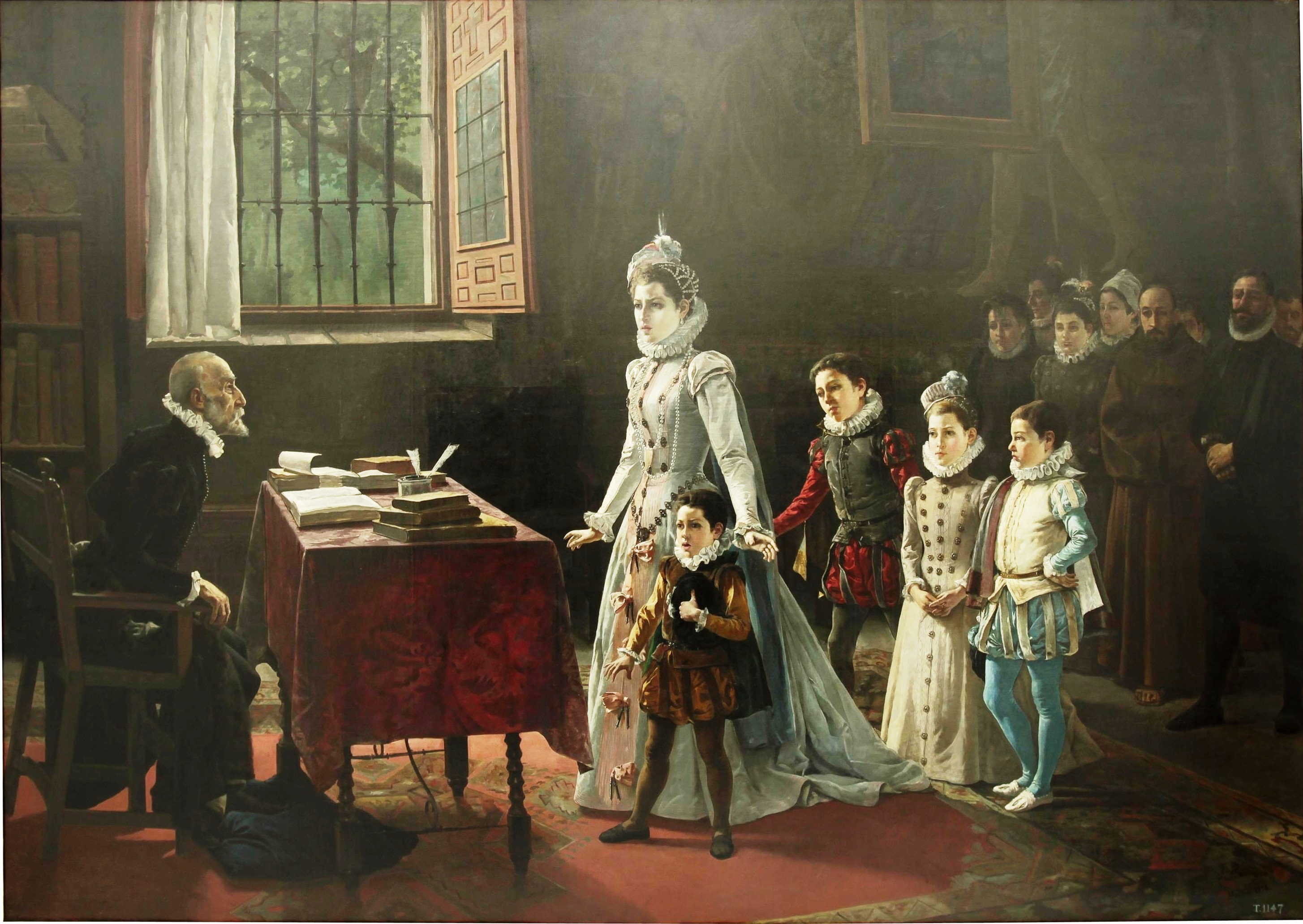 La obra representa a los hijos de Antonio Pérez, que fue secretario del rey Felipe II de España, en presencia de Rodrigo Vázquez de Arce, presidente del Consejo de Castilla.